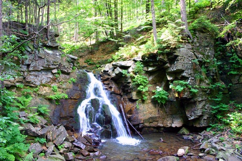 Barania Gora in Beskid Slaski (Poland)